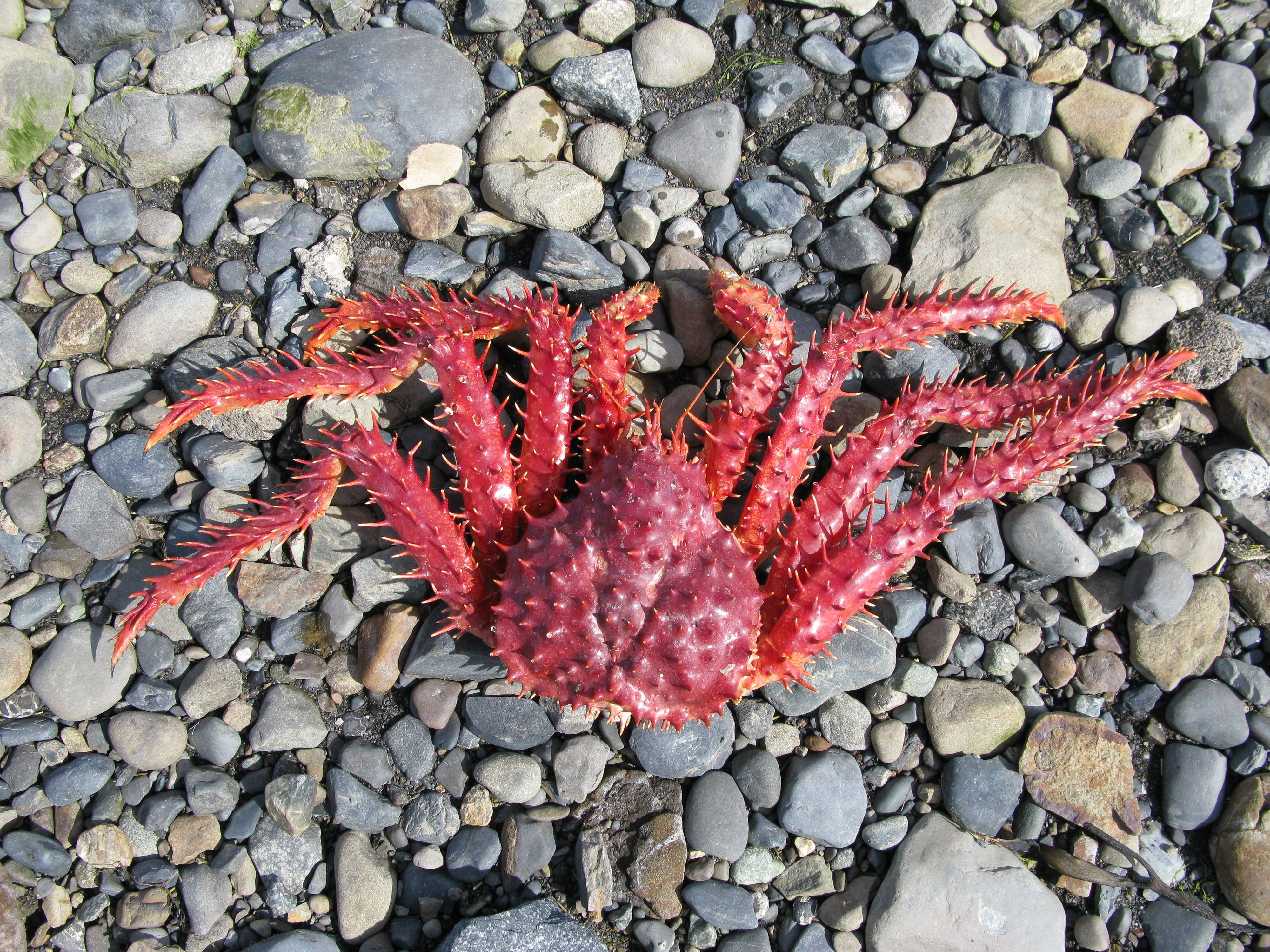 Vue du dessus, Lithodes santolla